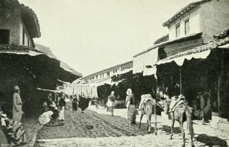 Escena del bazar de Scutari, actual Shkodër, Albania, hacia 1904.